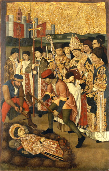 Un dels plafons del retaule de Sant Esteve de Granollers. Al MNAC es conserven catorze compartiments del mateix conjunt.